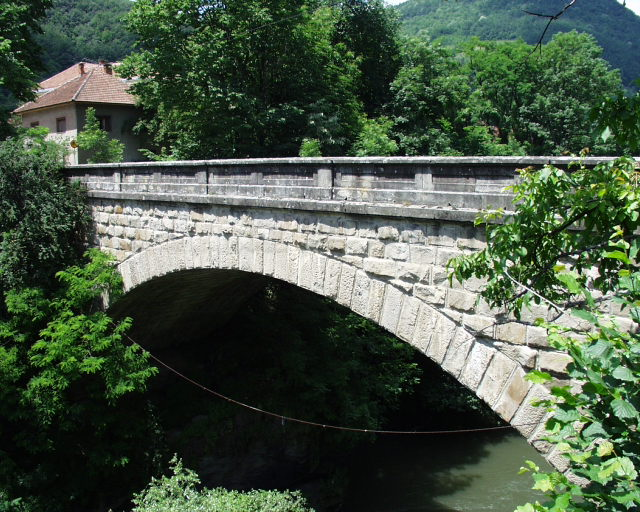 Kameni most